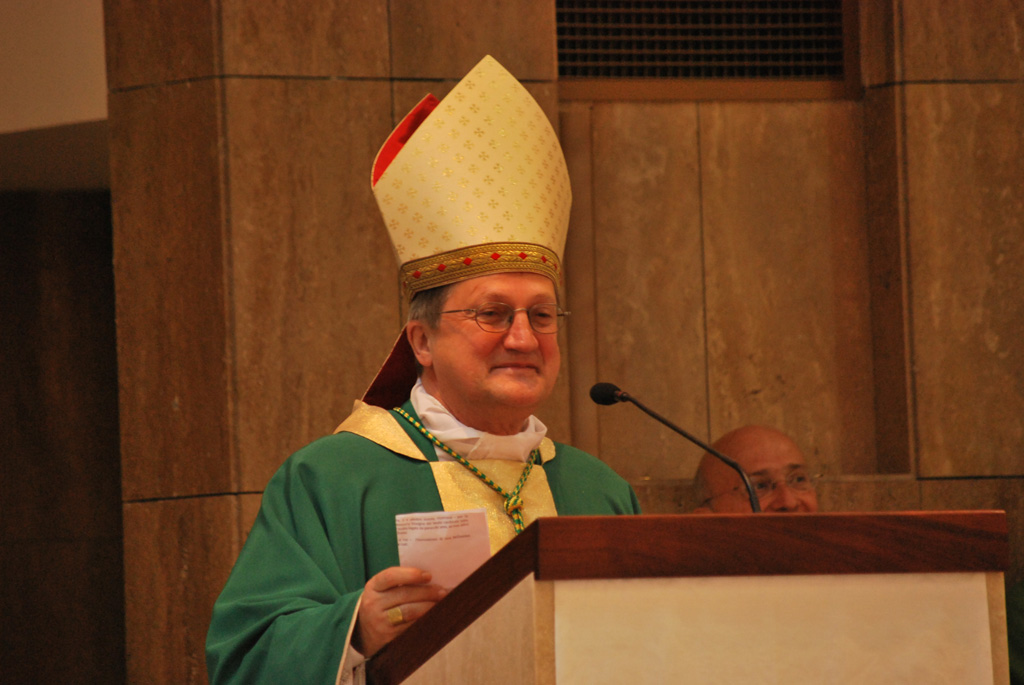 Enrico dal Covolo, SDB. Foto di Antonino Garufi